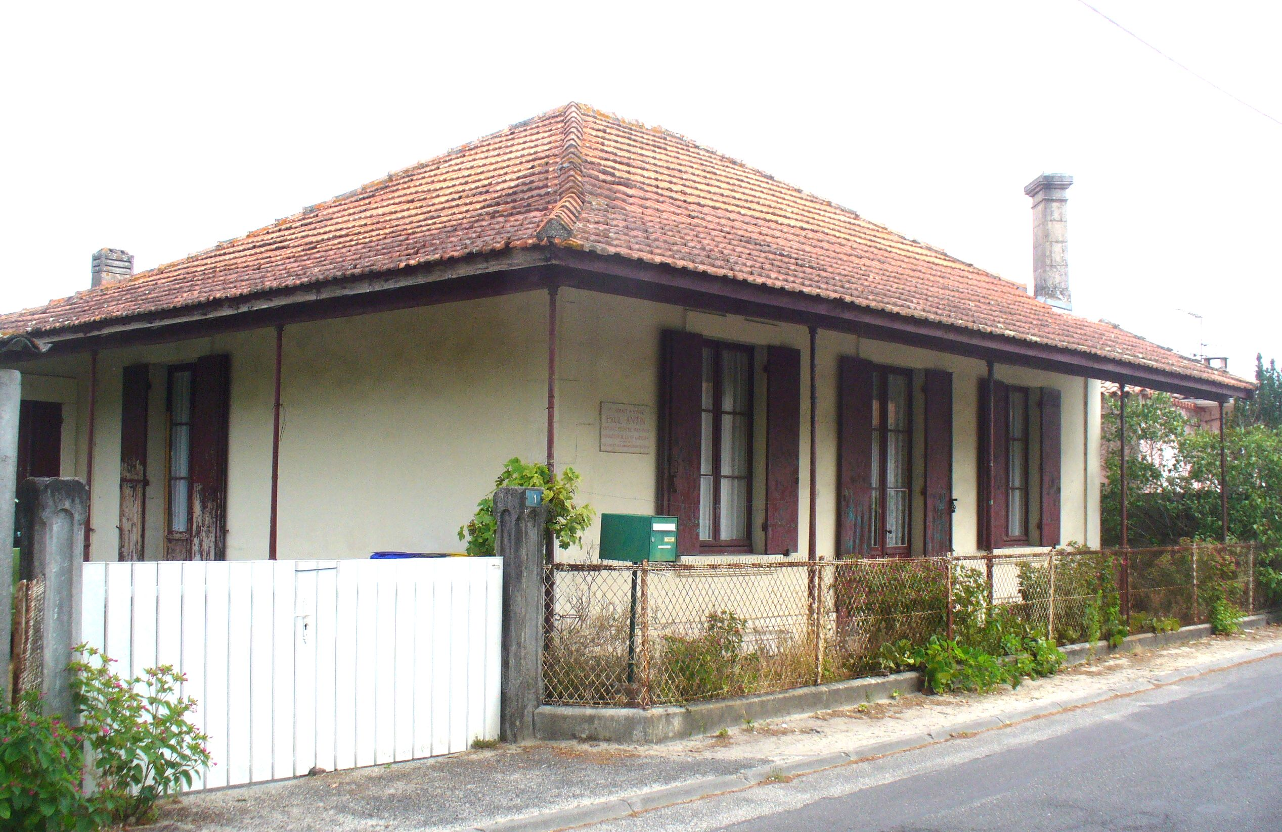 rue-Republique